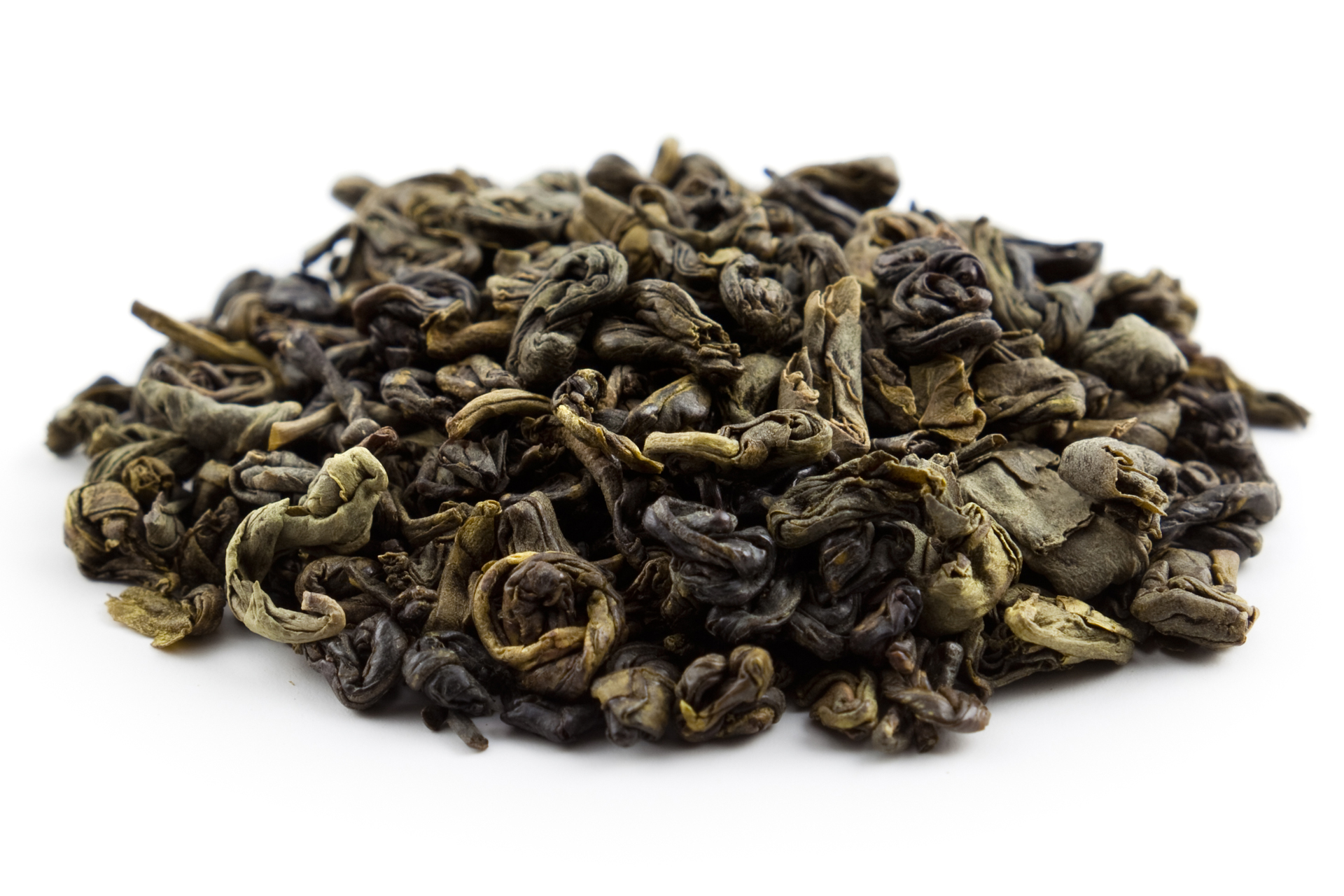 Grüner Tee Gunpowder